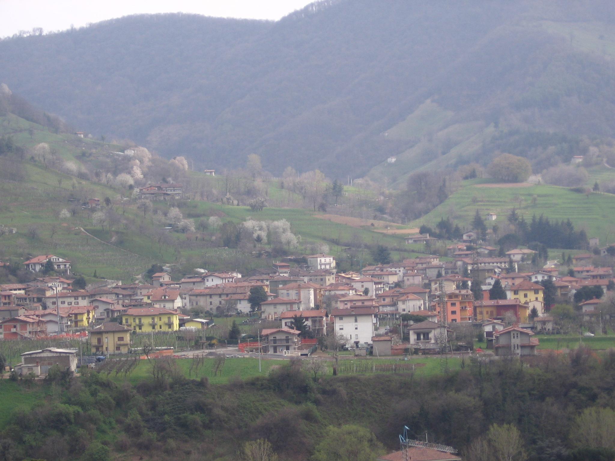 Berzo San fermo, Bergamo, Italia